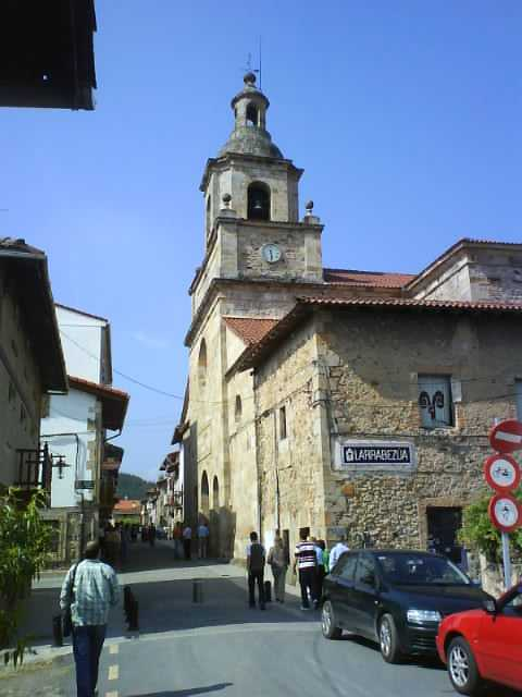 Iglesia de Larrabetzu, Vizcaya, País Vasco